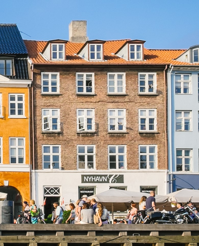 Nyhavn 33 in Copenahgen, Denmark Copenhagen, Denmark